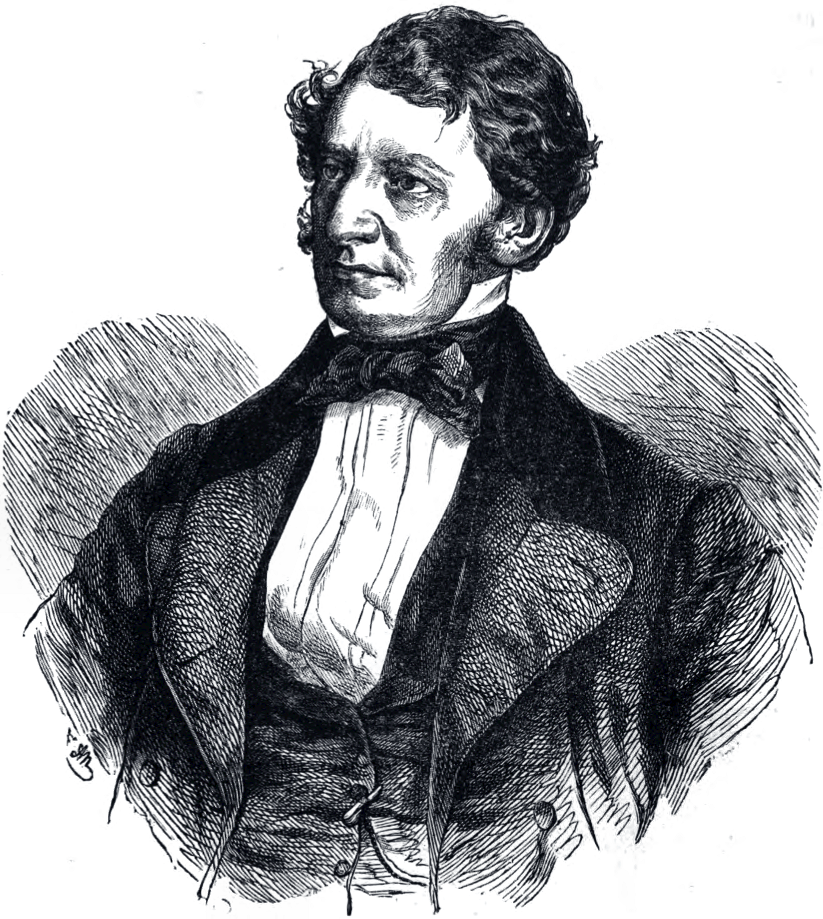 Georg Ritter von Toggenburg vor 1859